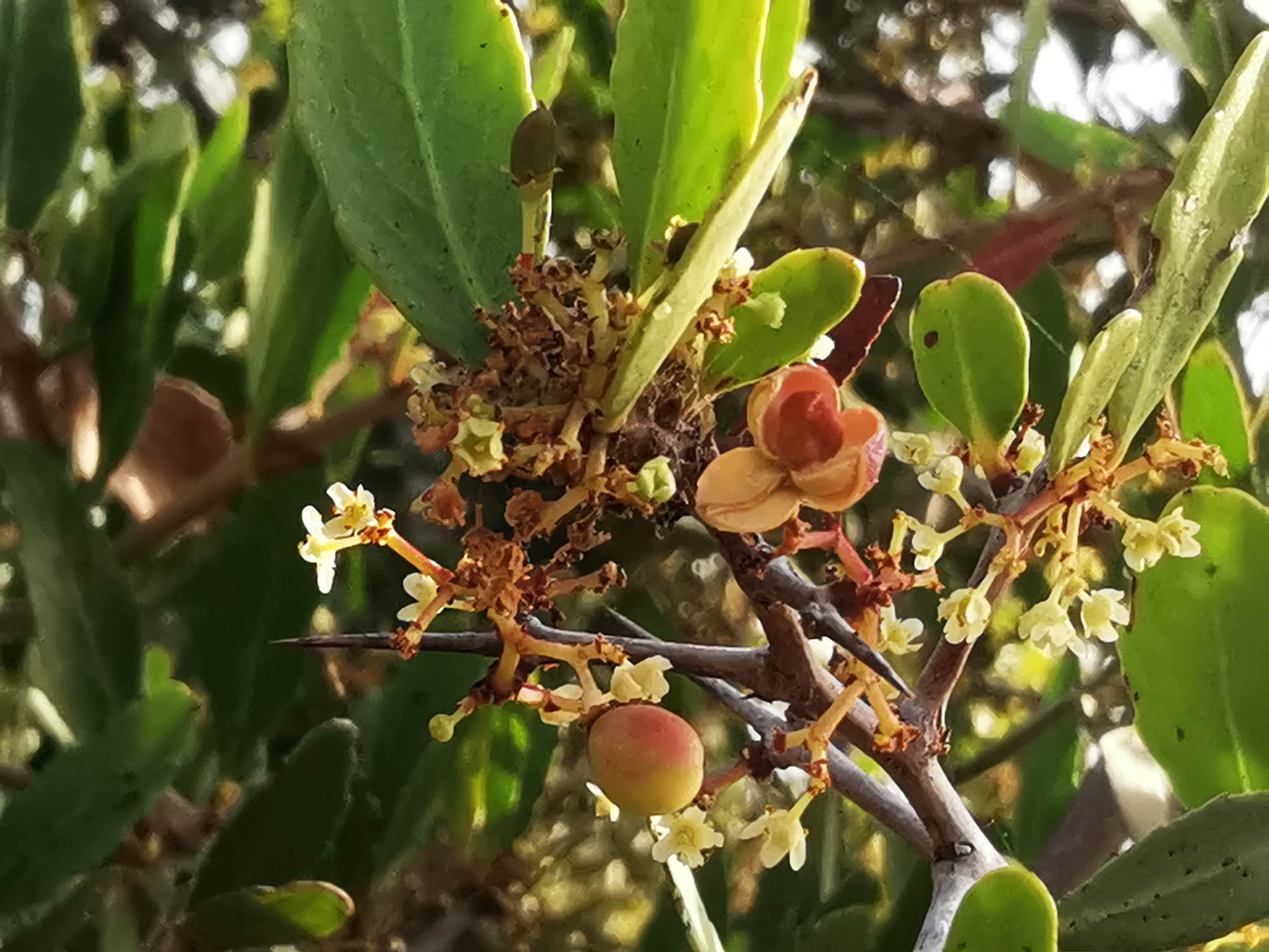 Maytenus senegalansis, hojas, flores, frutos y semillas en el entorno del Mar Menor, Cartagena, España.